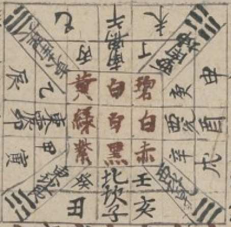 粵語: 此為雍熙三年具註曆中記方位（即公元九百八十六年）